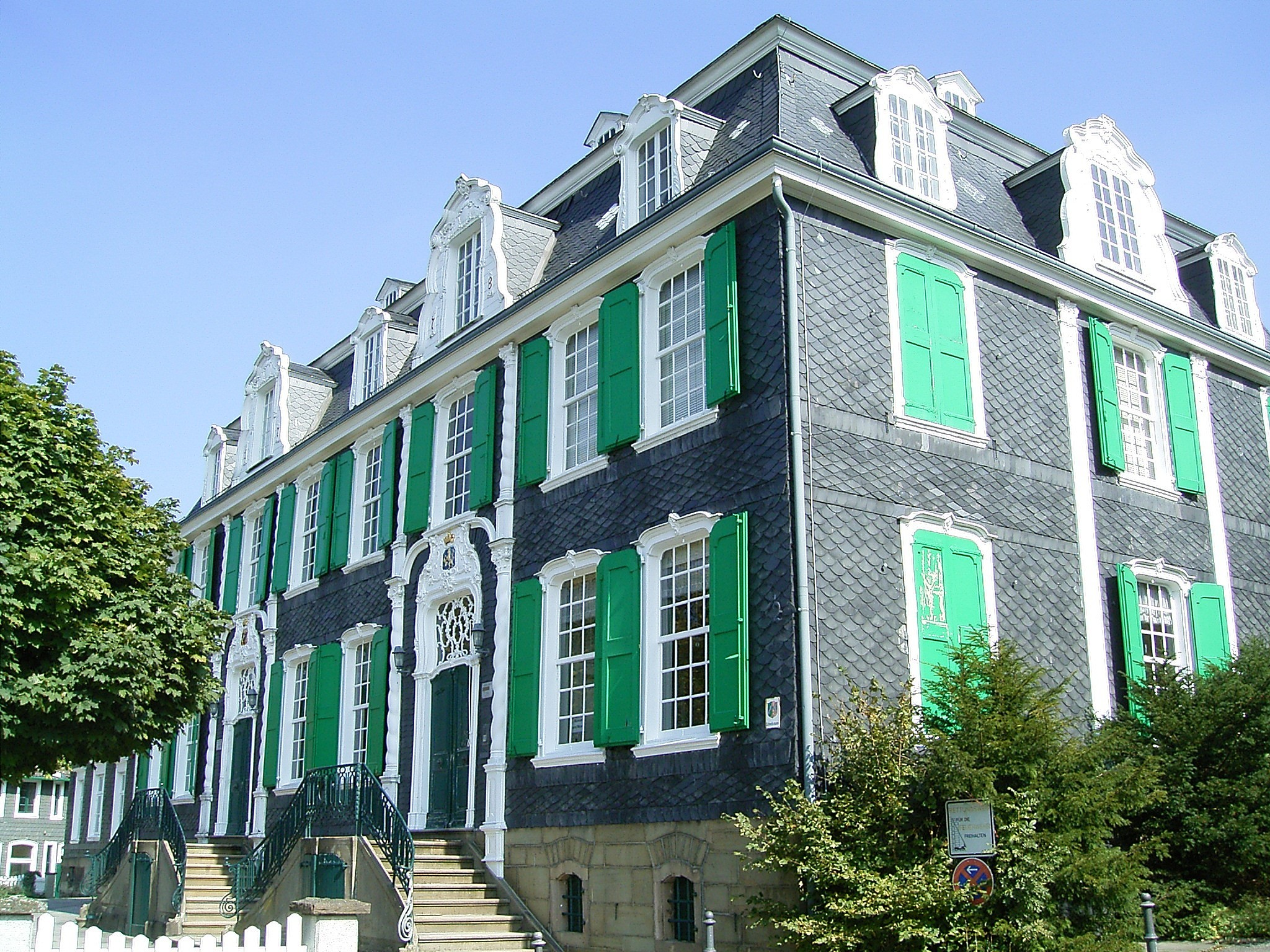 Haus Cleff: Heimatmuseum und Historisches Zentrum in Remscheid / Remscheid town museum